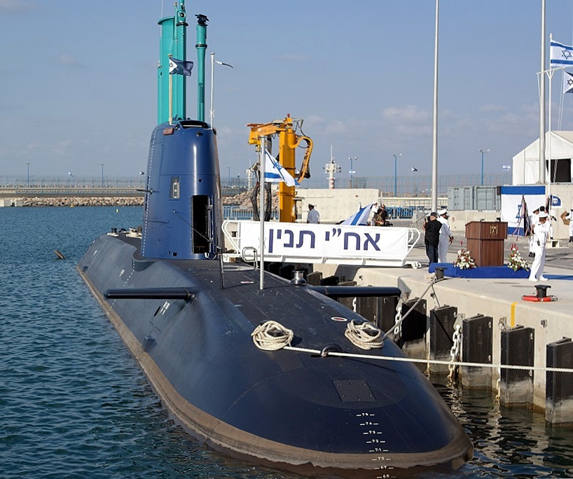 INS Tanin - the new Dolphin II class submarine of the Israeli Navy during the welcome ceremony in Haifa nava base. Just arrived after a long journey from the manufacturer (TKMS-HDW shipyard) in Kiel, Germany.